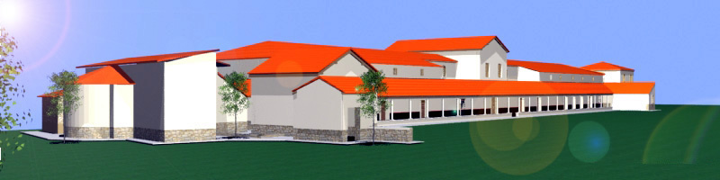 Villa gallo-romaine de Basse-Wavre: hypothèse de représentation